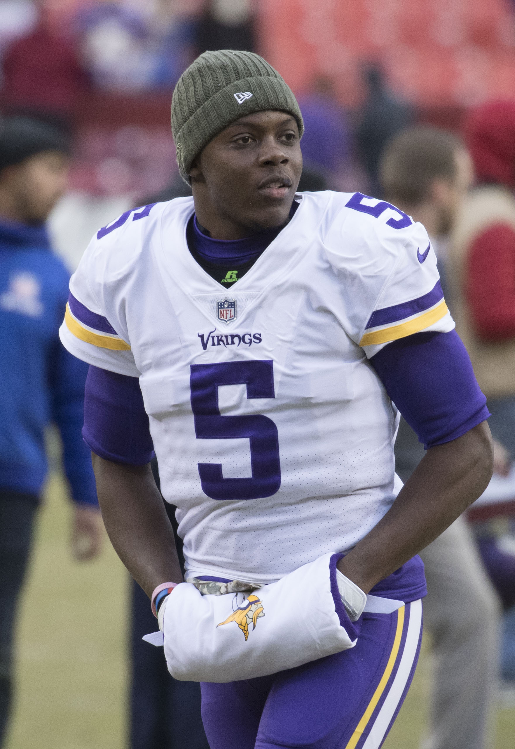 Vikings at Redskins 11/12/17